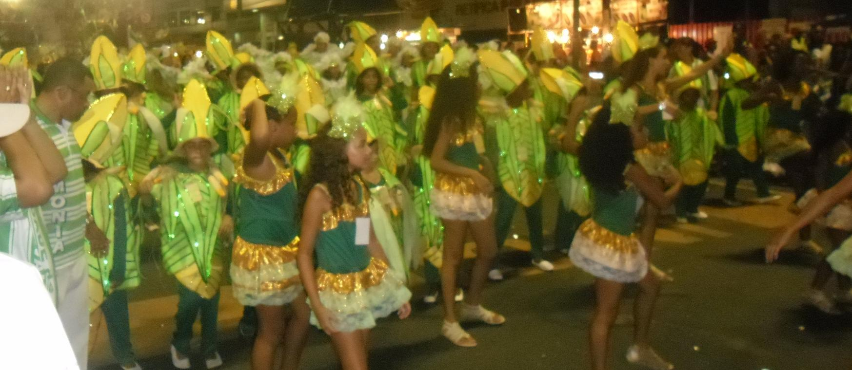 GRES Mocidade de Vicente de Carvalho